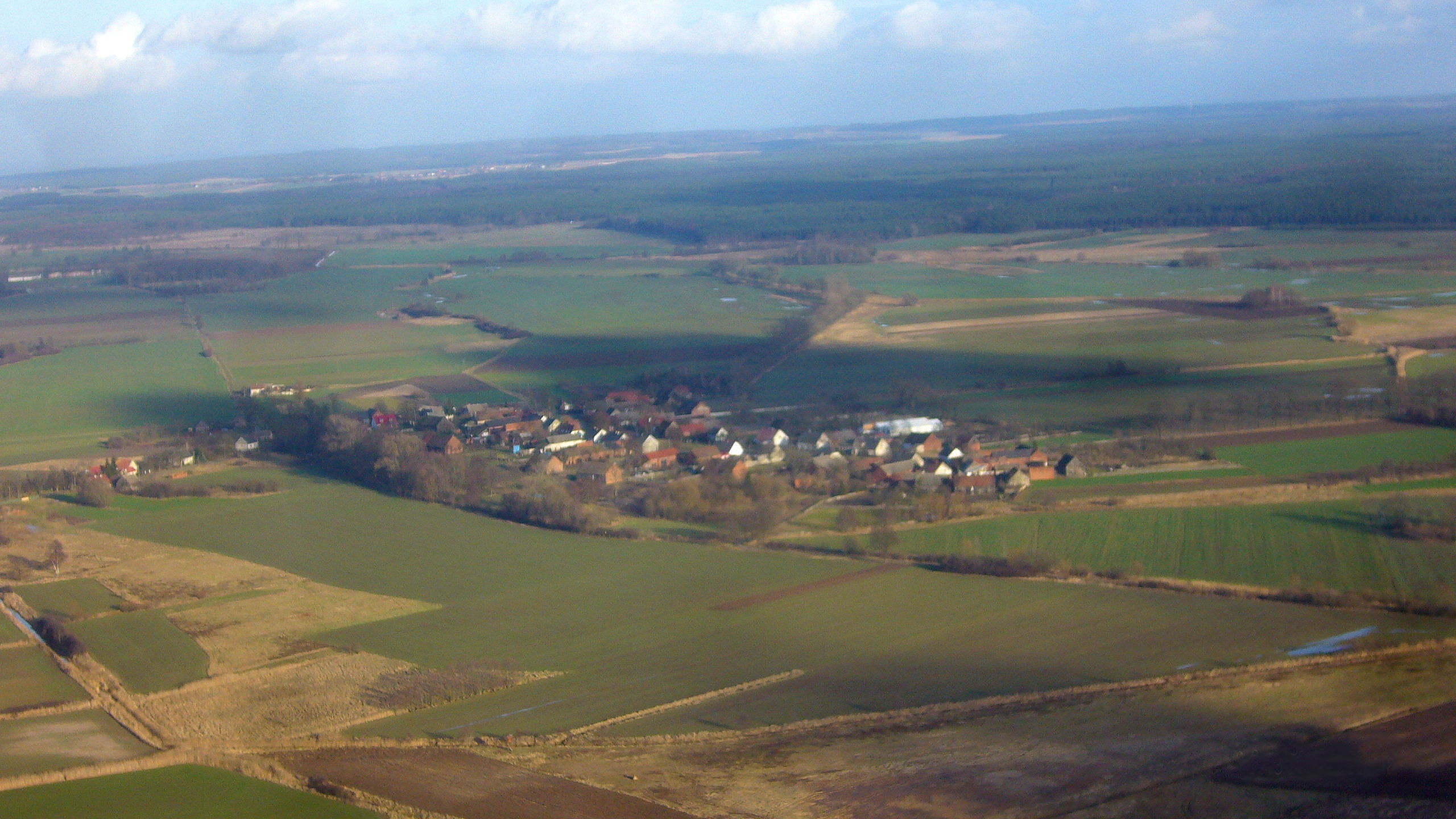 Kłopot (woj lubuskie). Autor: Kamil Królak